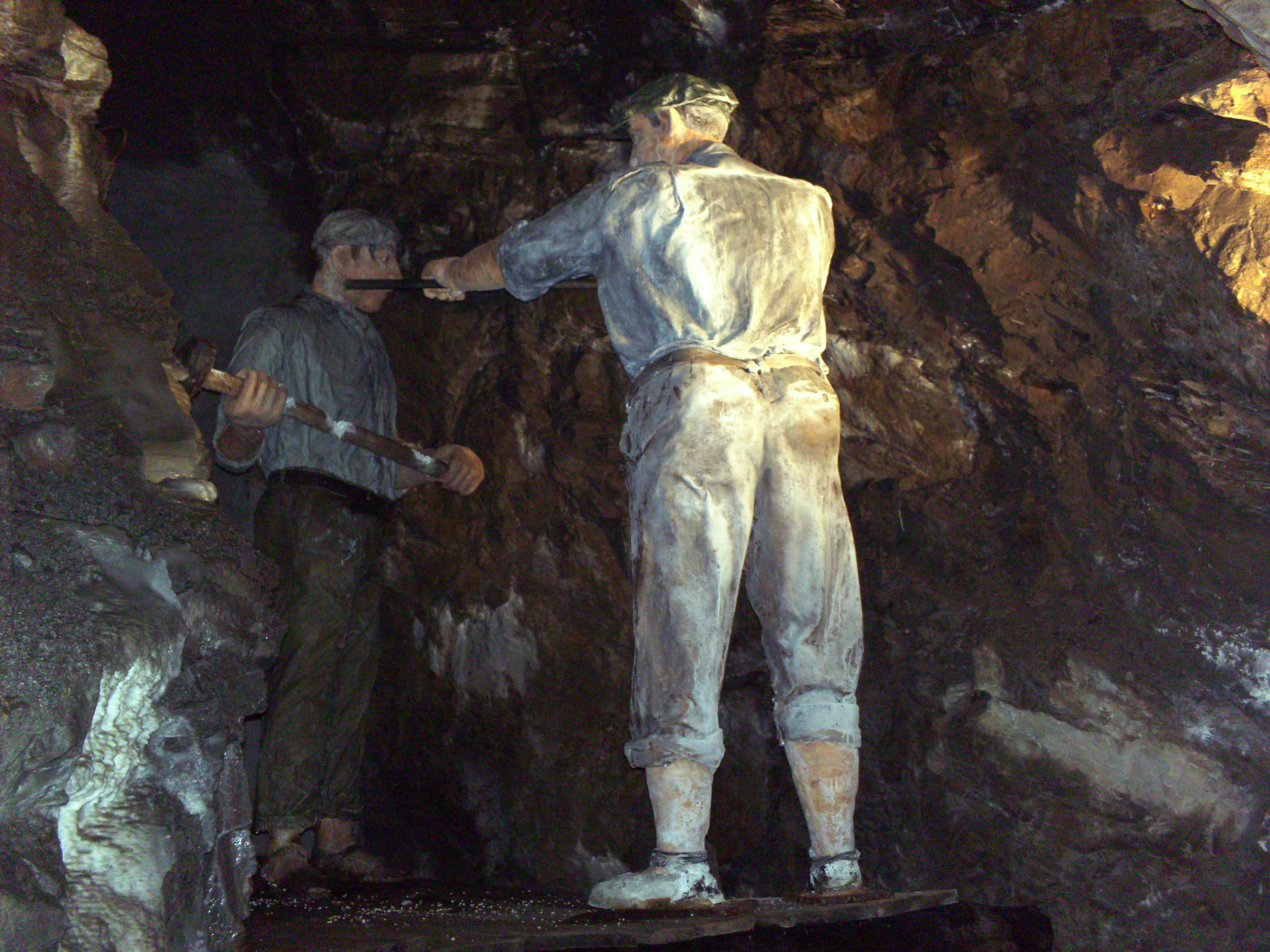 Reproducció de minaires treballant a l'interior de la mina de Bellmunt del Priorat, al primer soterrani.